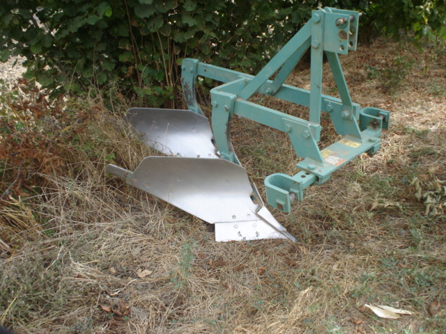 Aratro a doppio versoio, aratro portato